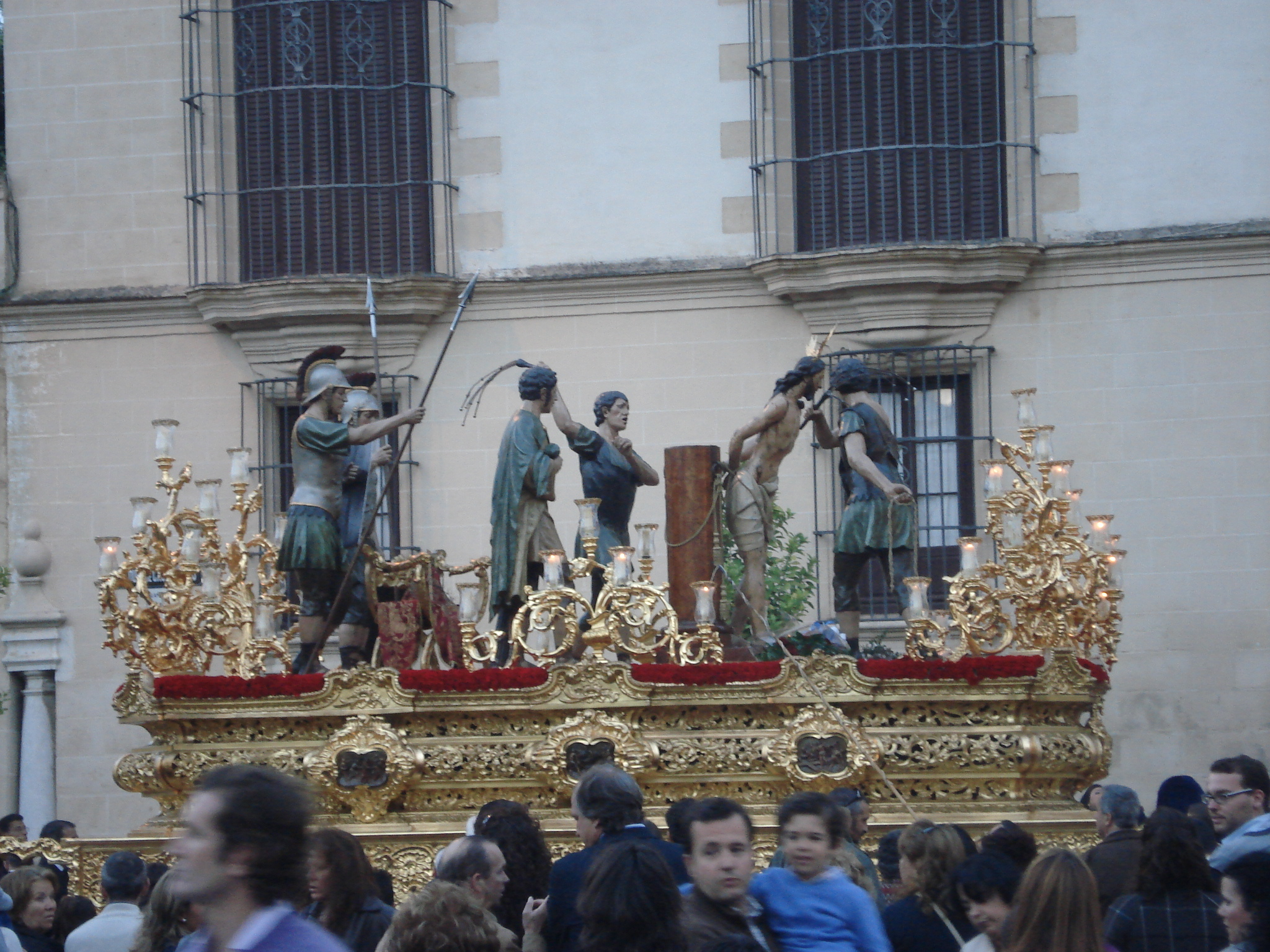 Semana Santa 2011 Jerez